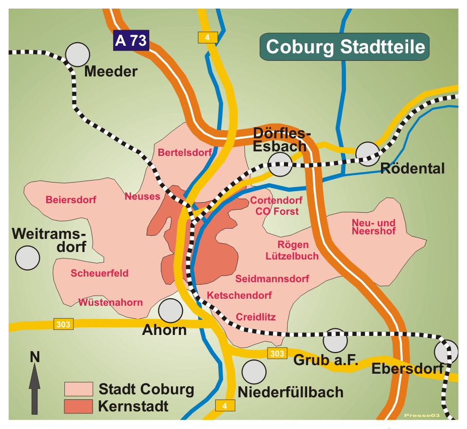 Coburg und seine Stadtteile